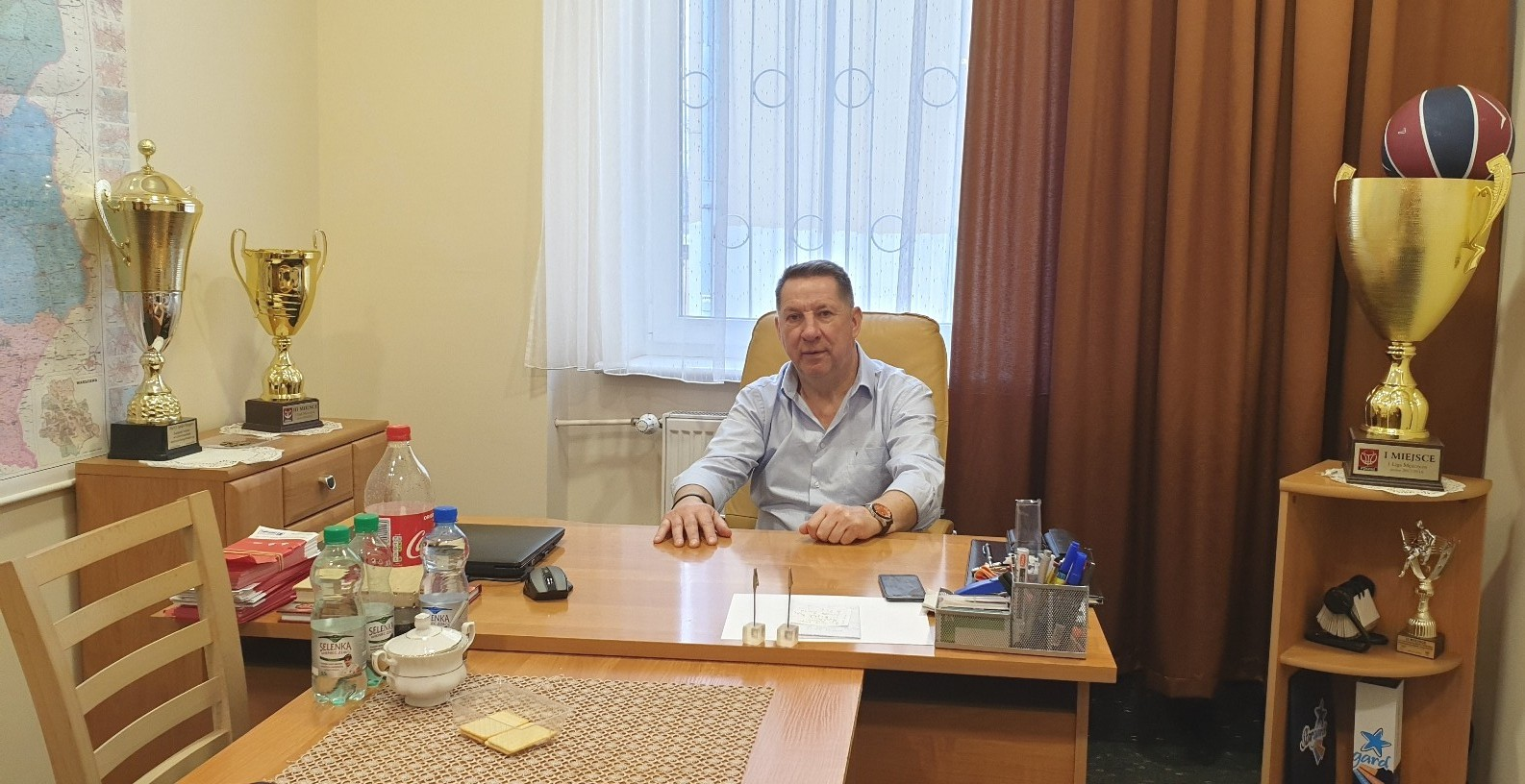 Koordynar w PGE Spójnia Stargard Krzysztof Koziorowicz